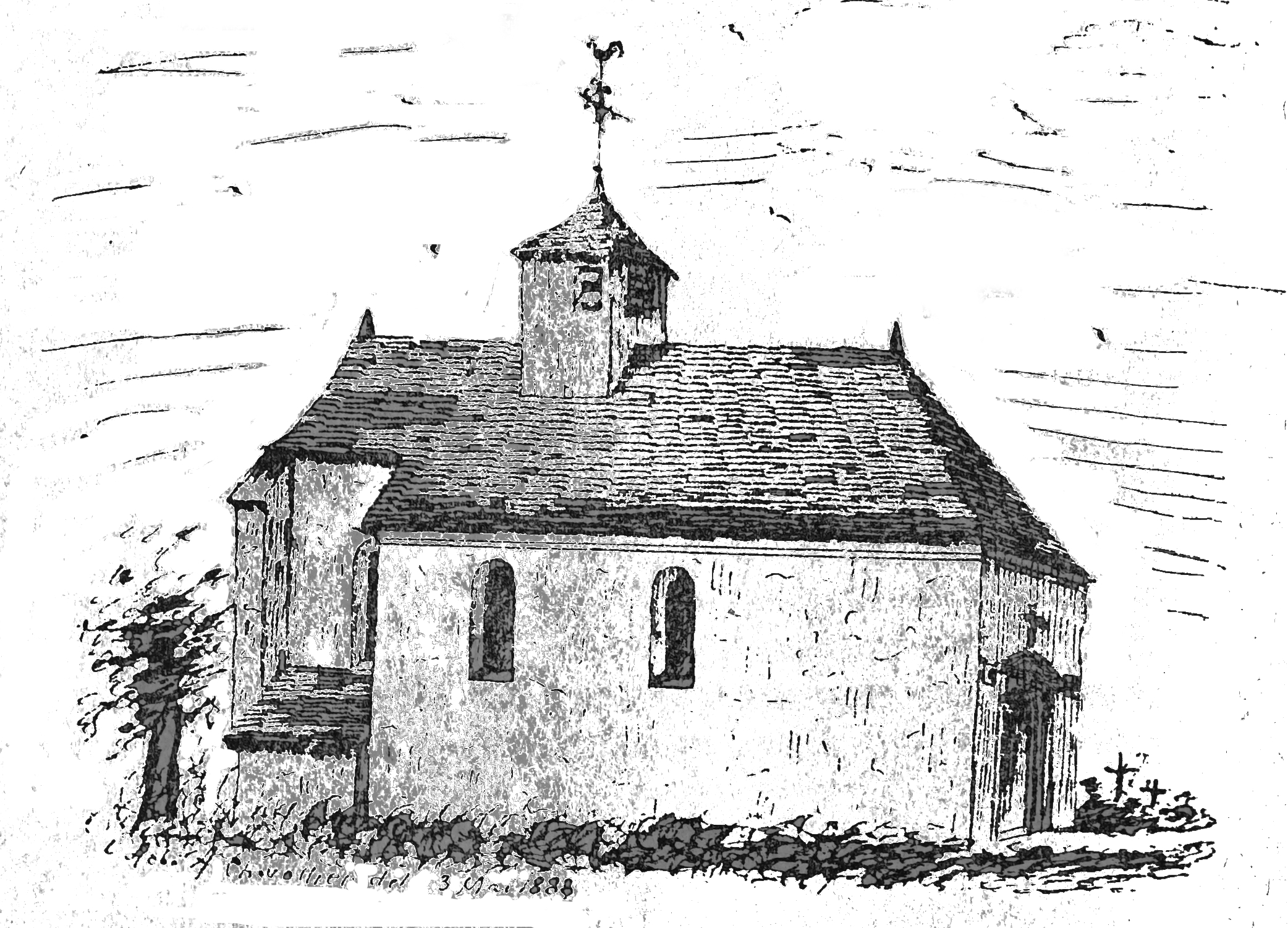 eglise de bertoncourt.